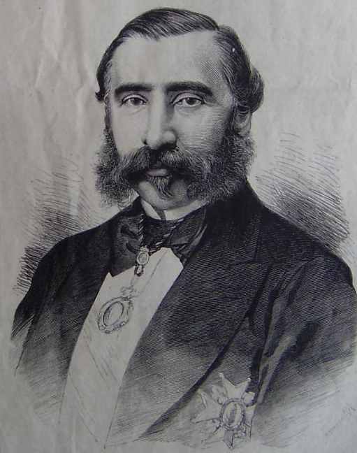 Spanish Politician Manuel Alonso Martínez